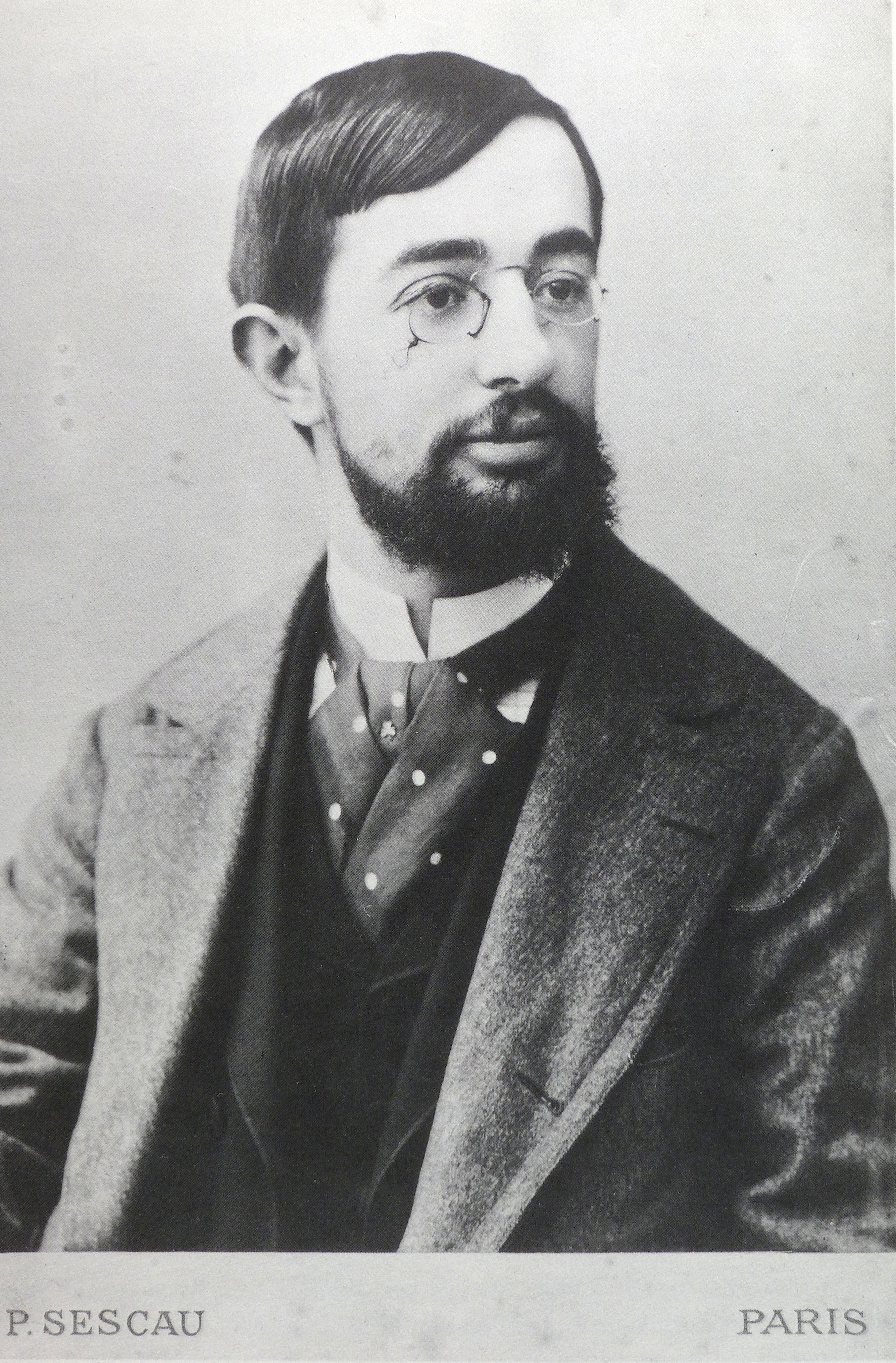 Portrait de Henri de Toulouse-Lautrec par son ami photographe Paul Sescau. Cliché vers 1880/1890